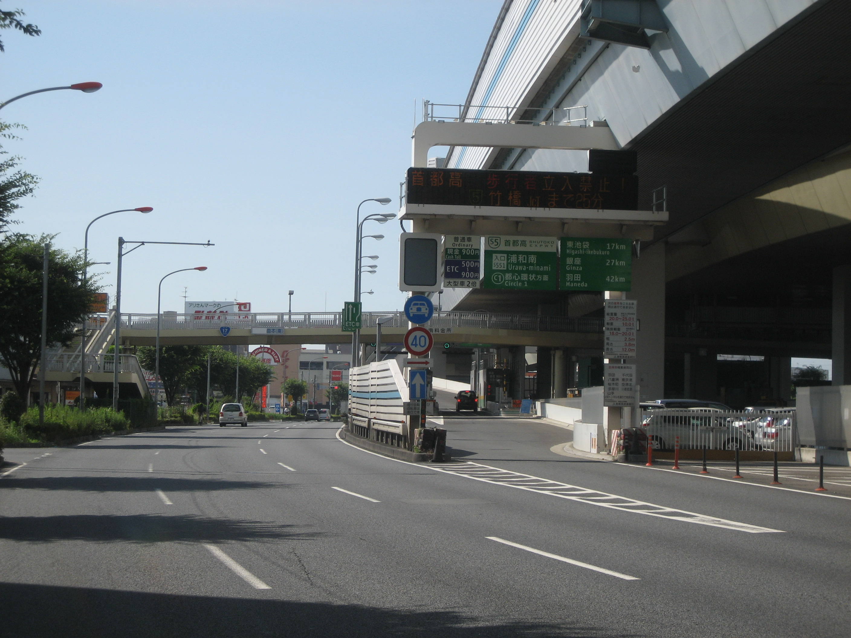 首都高速埼玉大宮線浦和南入口（美女木JCT方面）